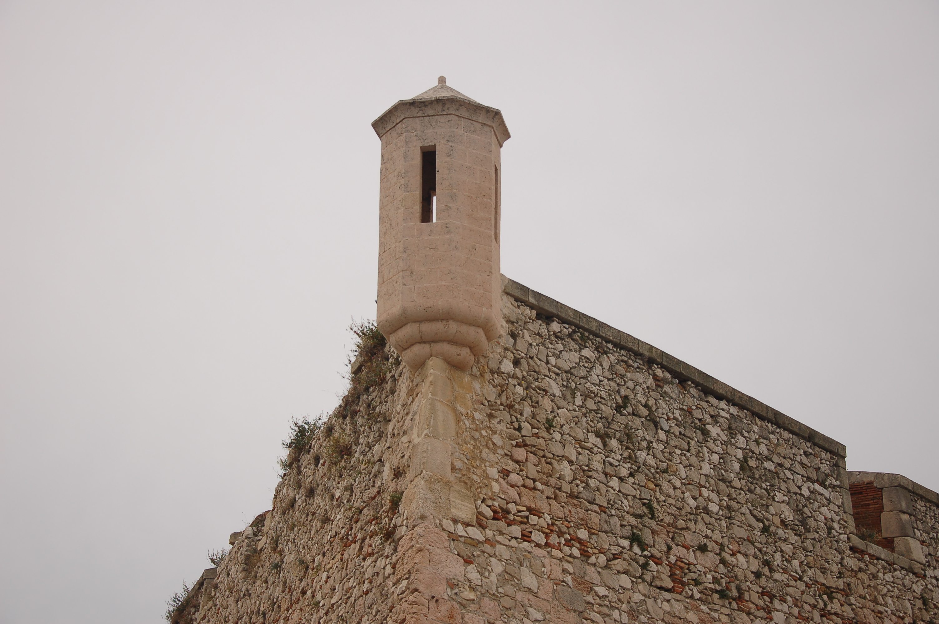 Habillage d'un des bastions du Fort d’Entrecasteaux, partie haute du Fort Saint Nicolas à Marseille. Le fort, disposé en étoile, a été réalisé par le Chevalier de Clerville, ingénieur militaire français qui fût entre autres le maître de Vauban.